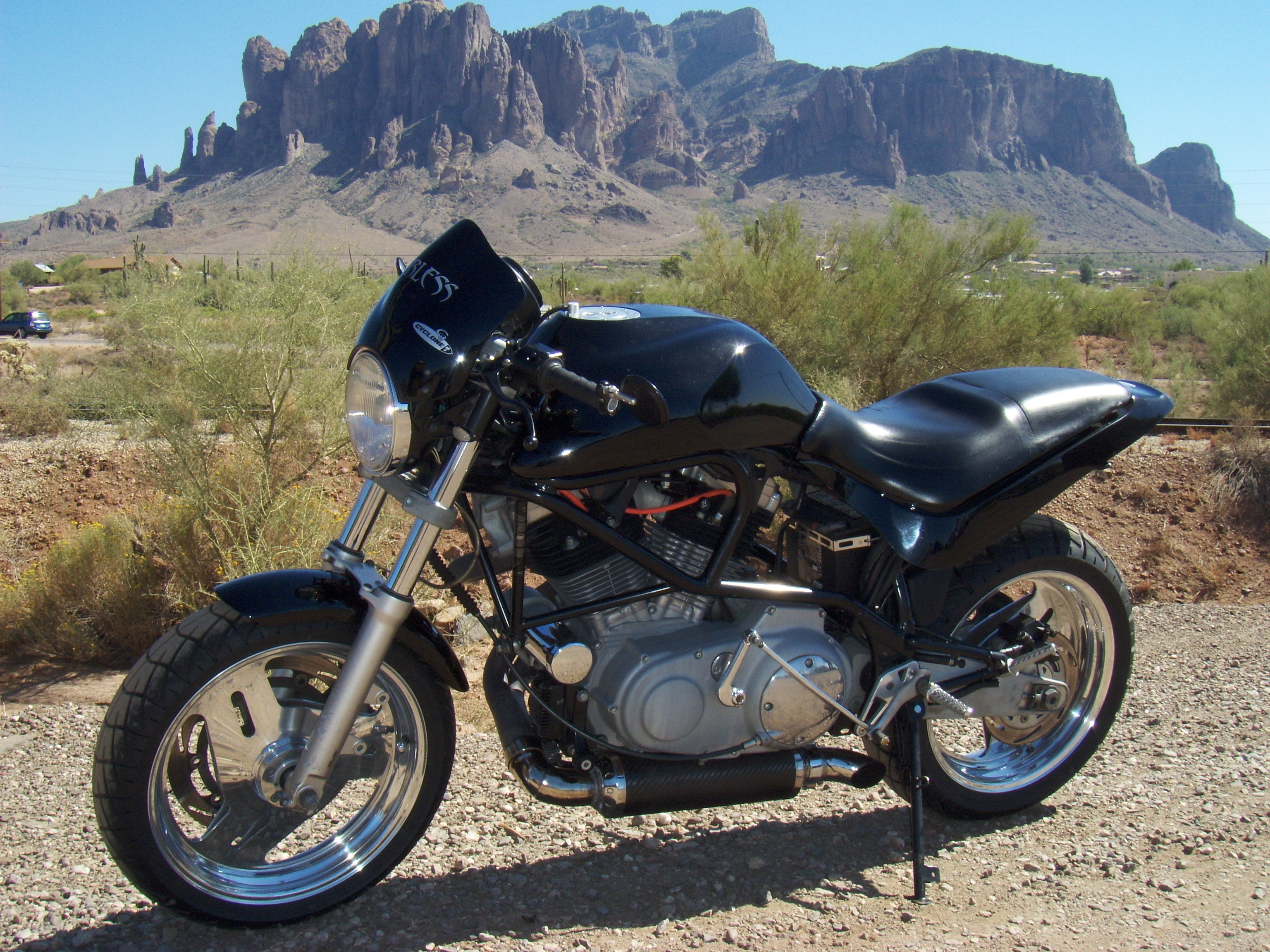 1999 Buell M2 Cyclone